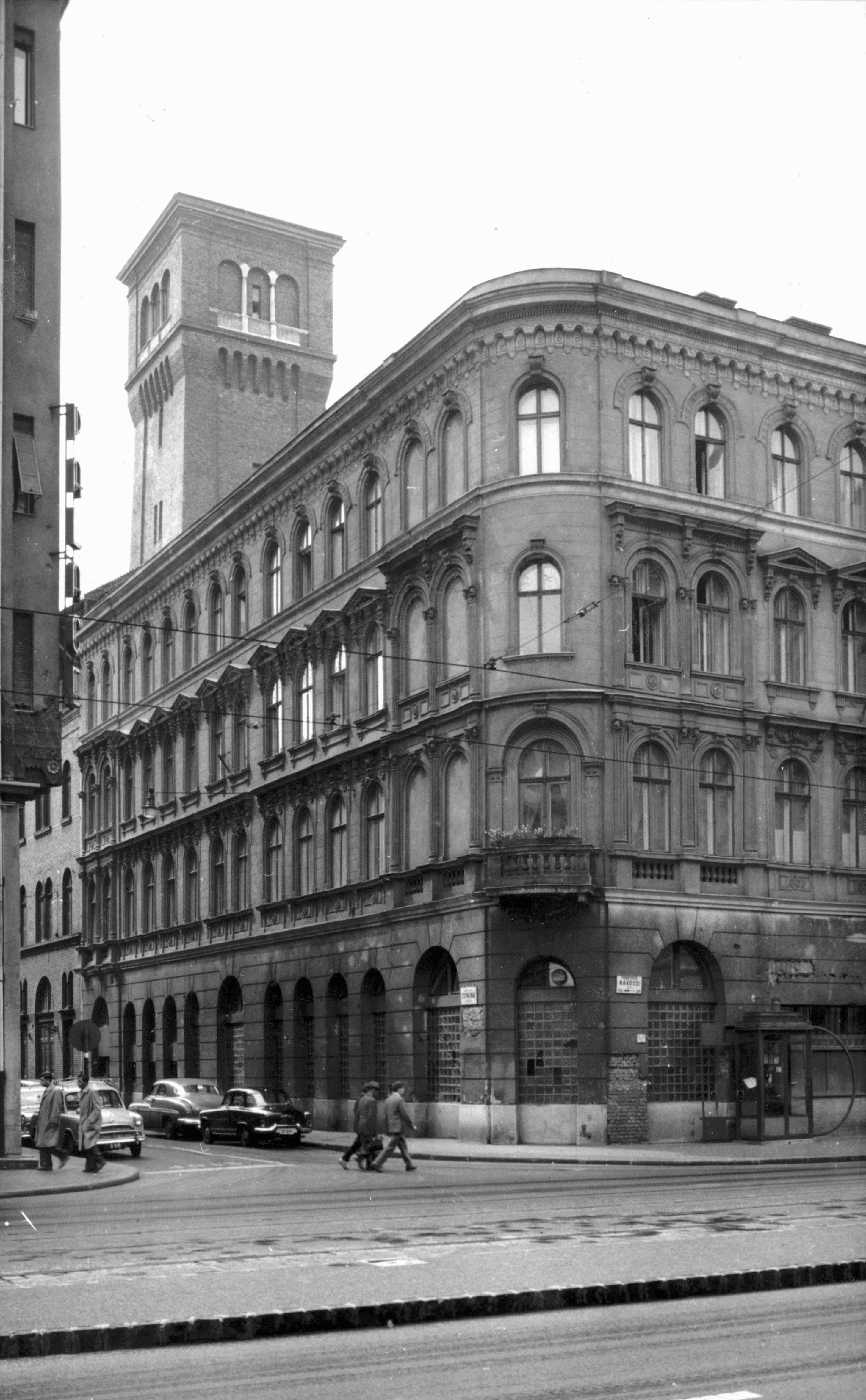 A kép forrását kérjük így adja meg: Fortepan / Budapest Főváros Levéltára. Levéltári jelzet: HU_BFL_XV_19_c_11 Location: Hungary Tags: Budapest Title: A kép forrását kérjük így adja meg: Fortepan / Budapest Főváros Levéltára. Levéltári jelzet: HU_BFL_XV_19_c_11